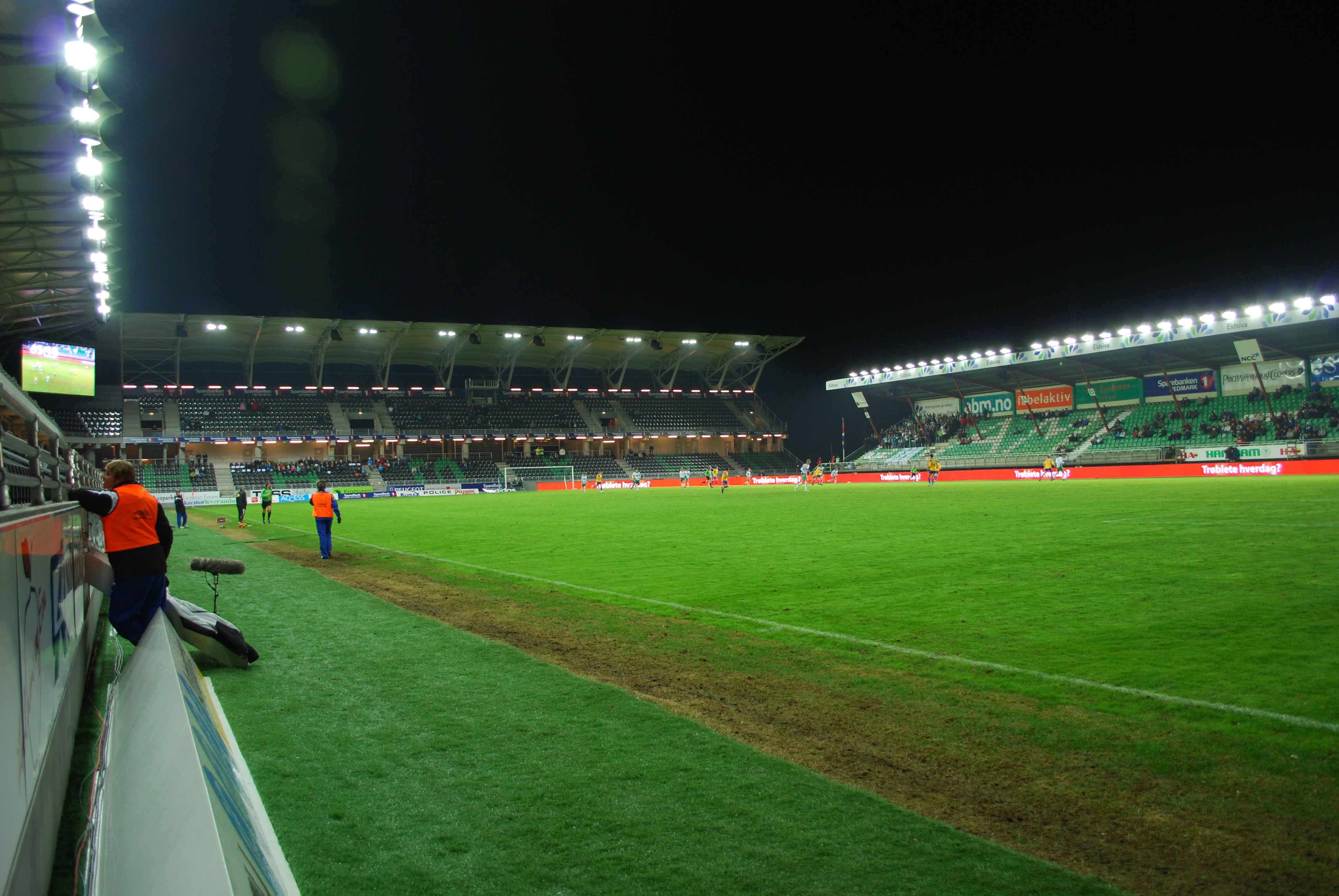 Den nordre tribuneseksjonen på Briskeby gressbane på Hamar, også navngitt som Sparebanken Hedmark-tribunen.